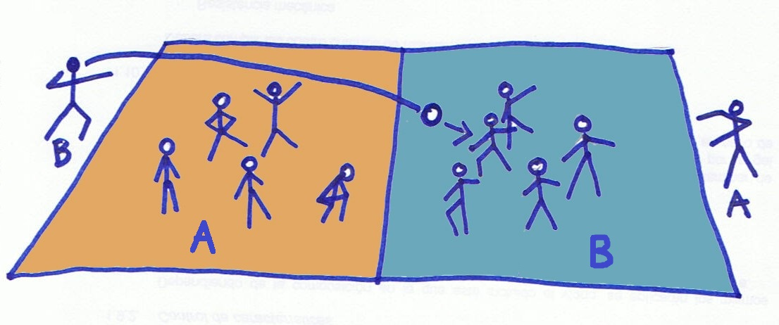 Brile edo "campo quemado" jokoaren grafikoa.